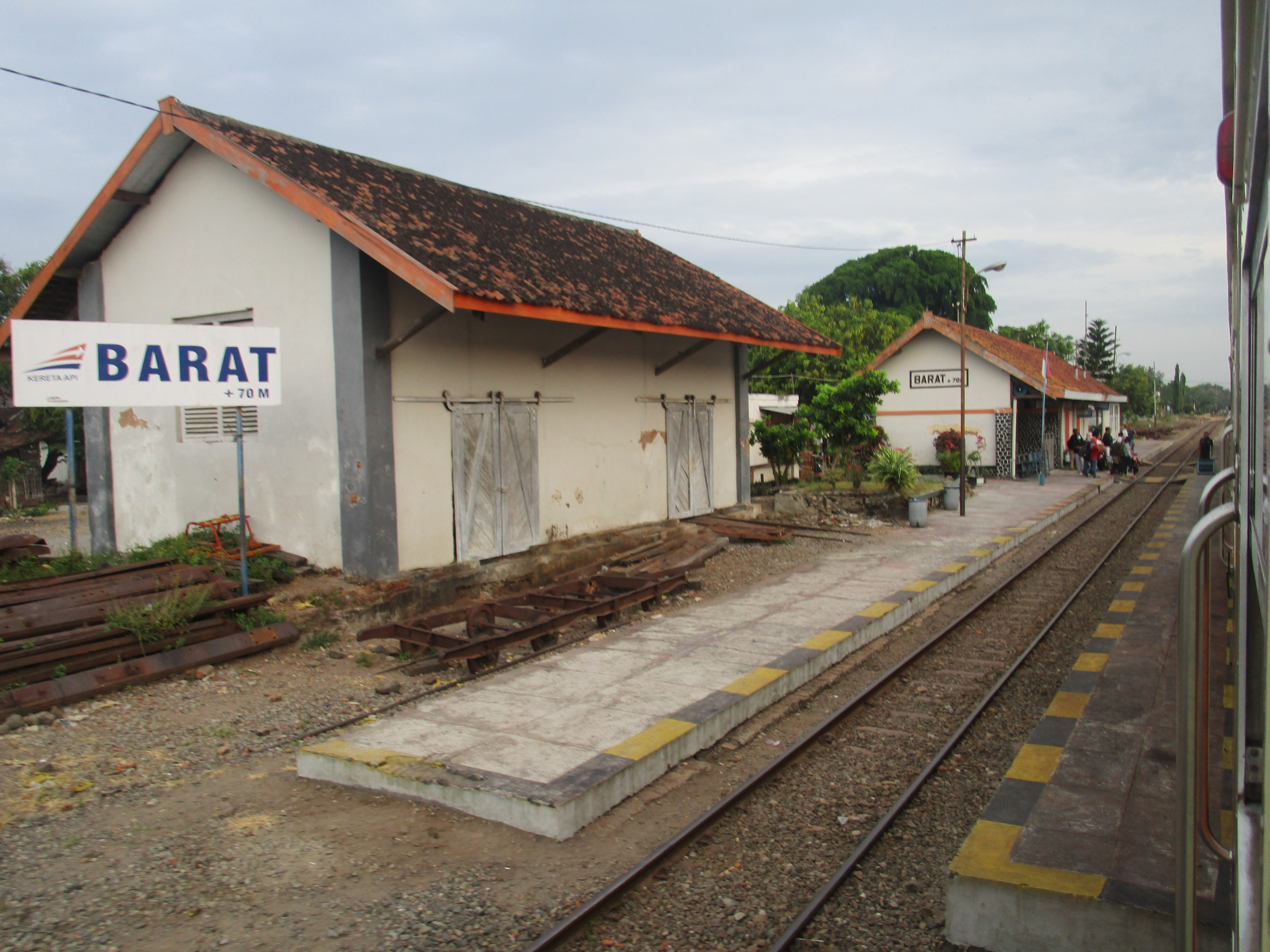 Stasiun Barat